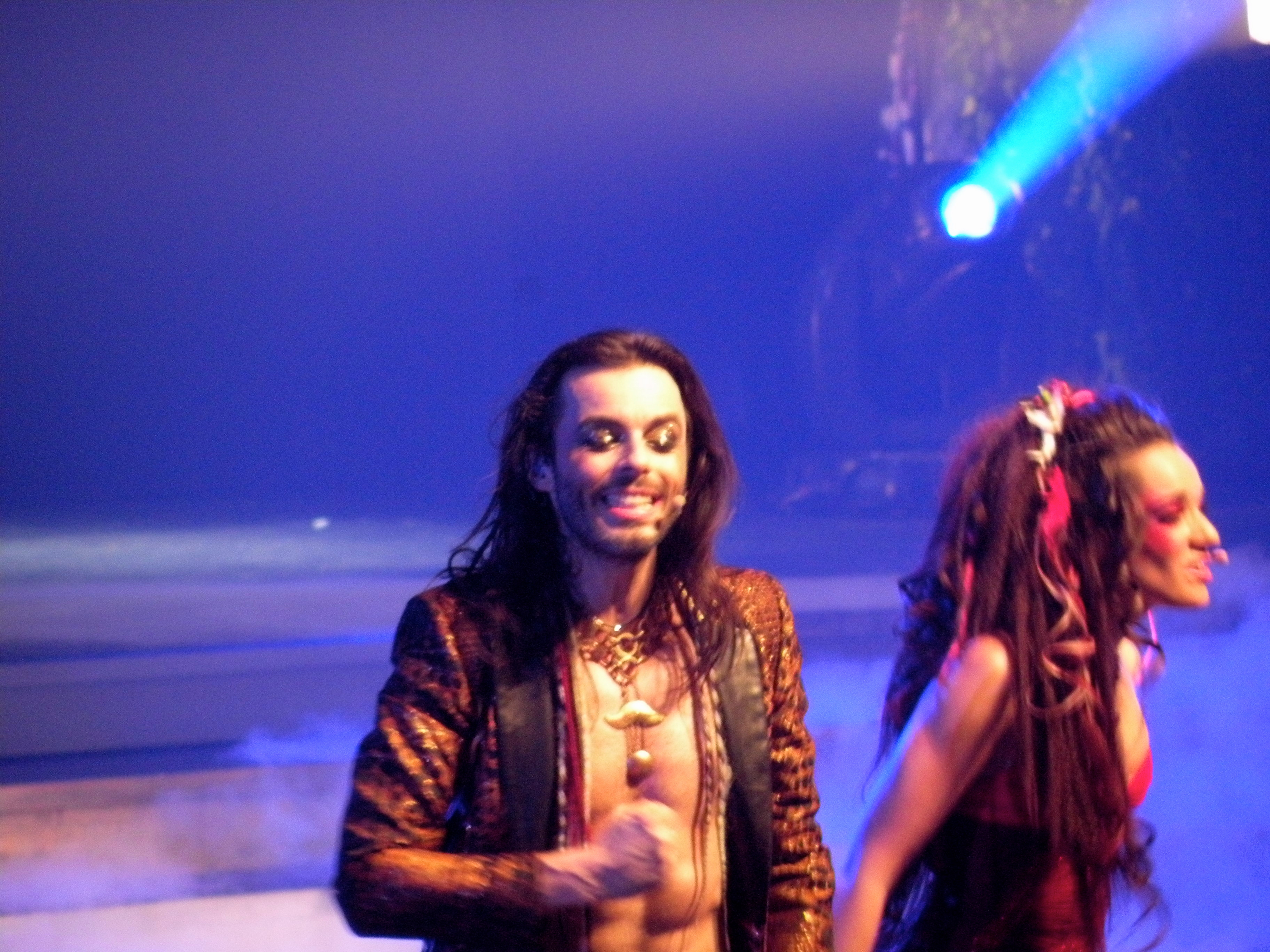 Nuno Resende et Noémie Garcia dans le role de snake et Strawberry